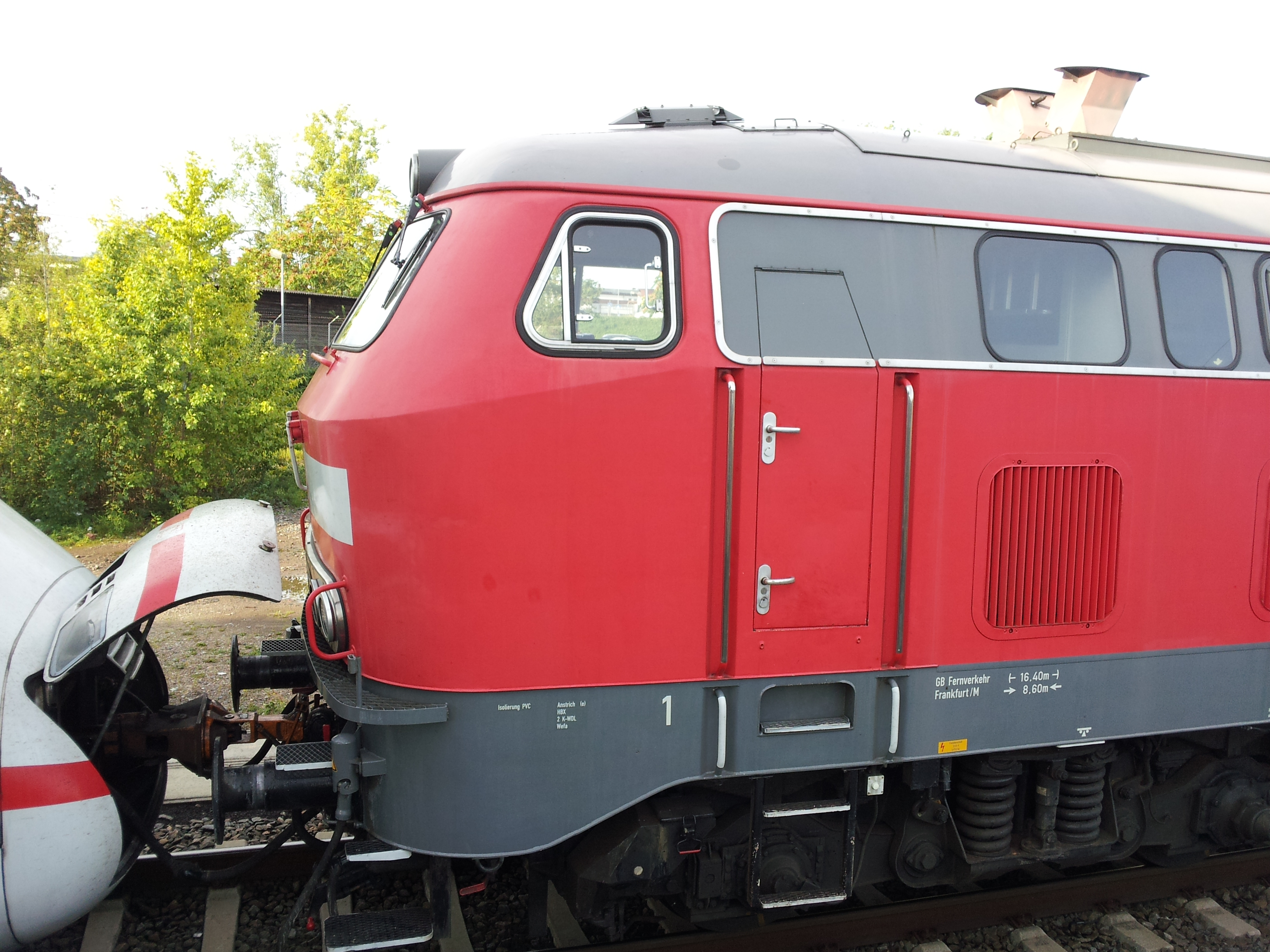 ICE notgekuppelt in Heidelberg am 12.09.2011